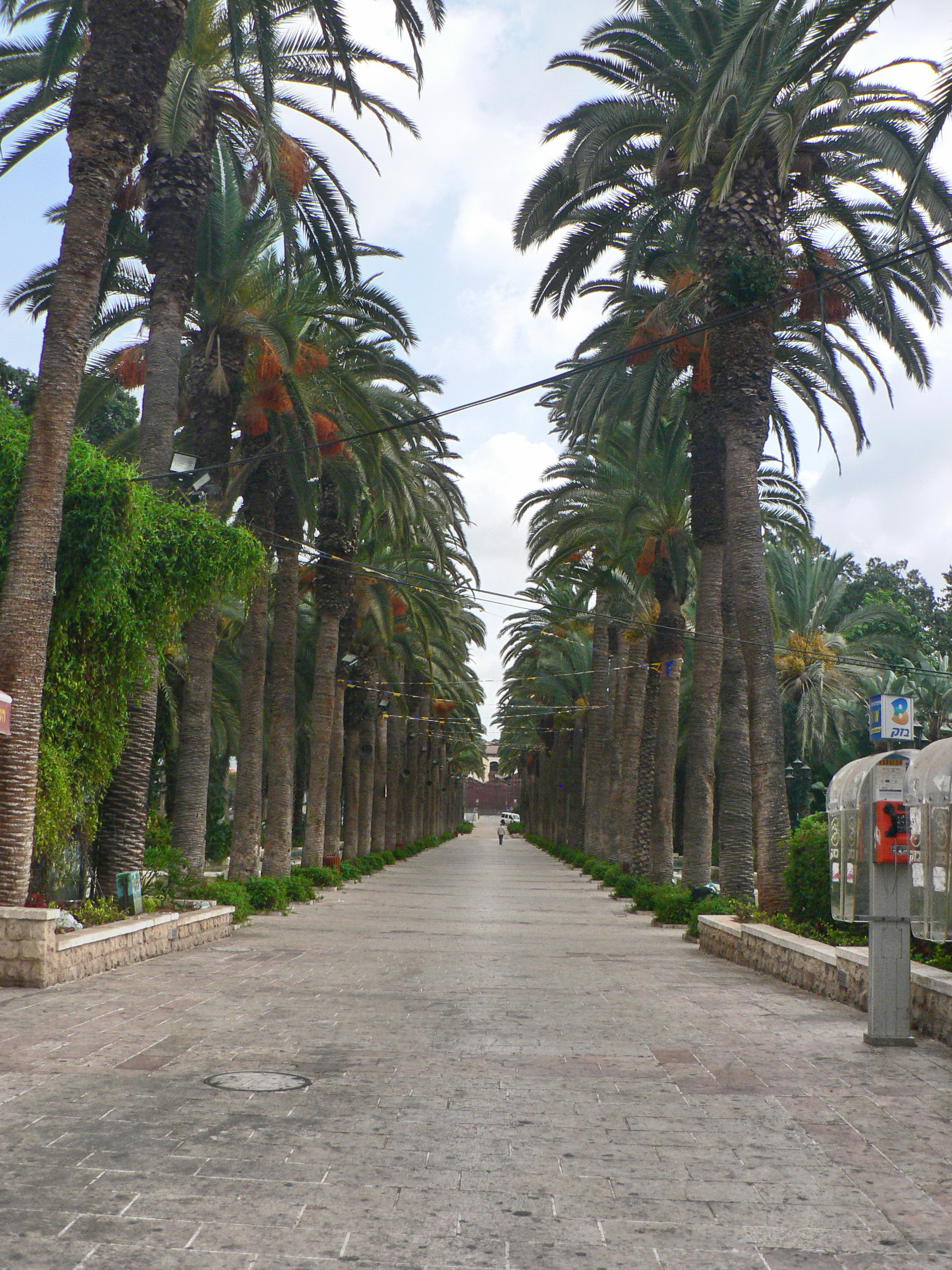 Rishon LeZion Village Park גן המושבה - ראשון לציון